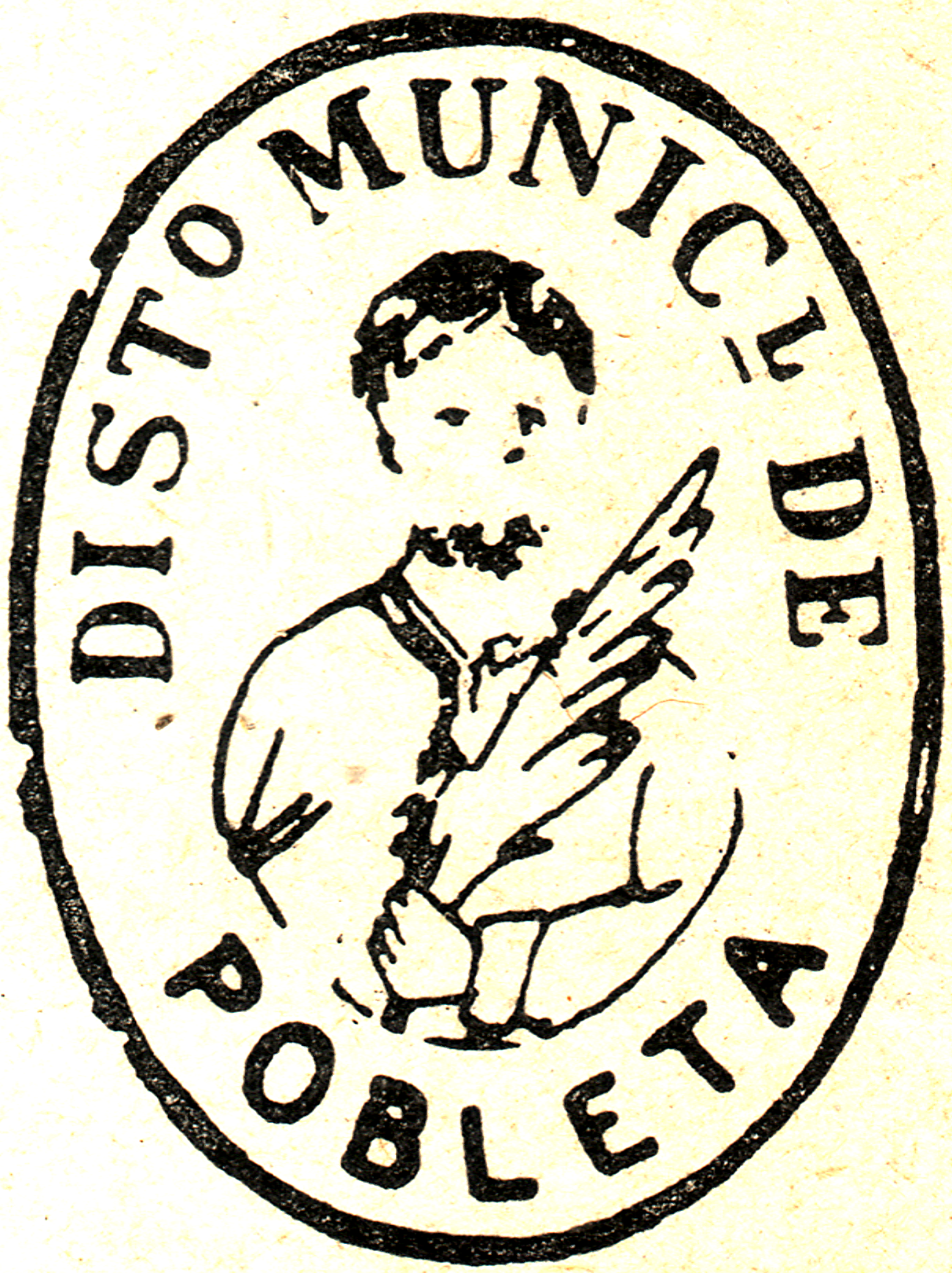 Segell antic de la Pobleta de Bellveí (la Torre de Cabdella, Pallars Jussà)